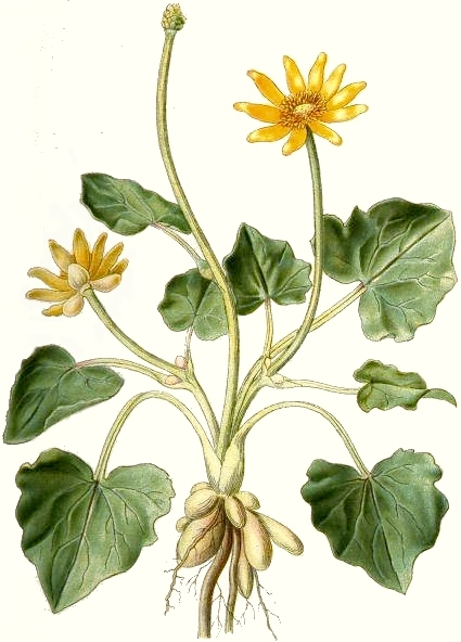 Original Description Svalört, Ranunculus ficaria L.